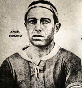 El uruguayo Ángel Romano jugando para Boca Juniors de Argentina